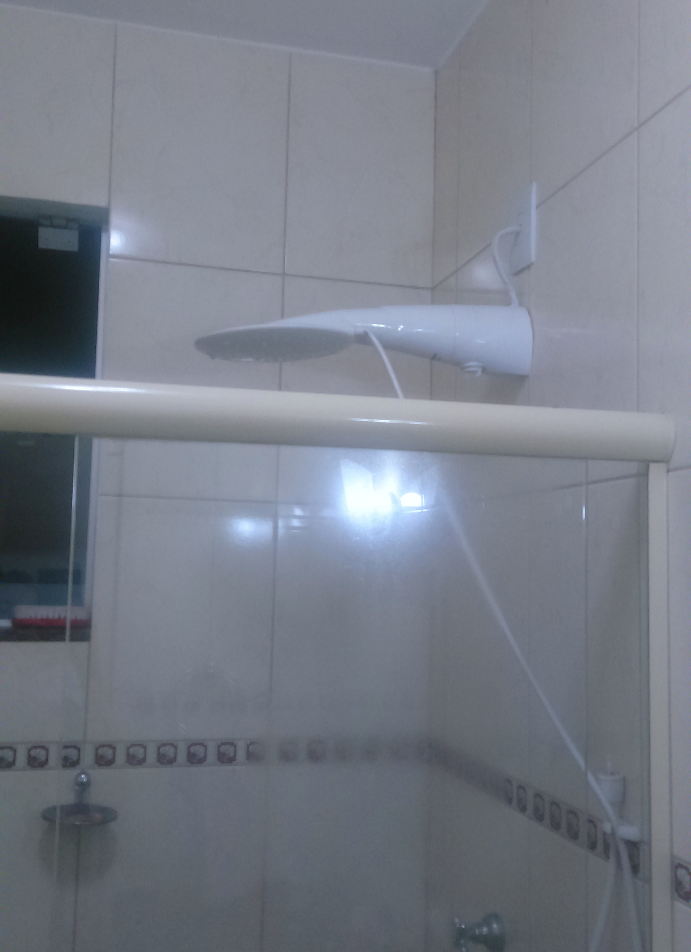 modelo brasileiro de chuveiro elétrico.